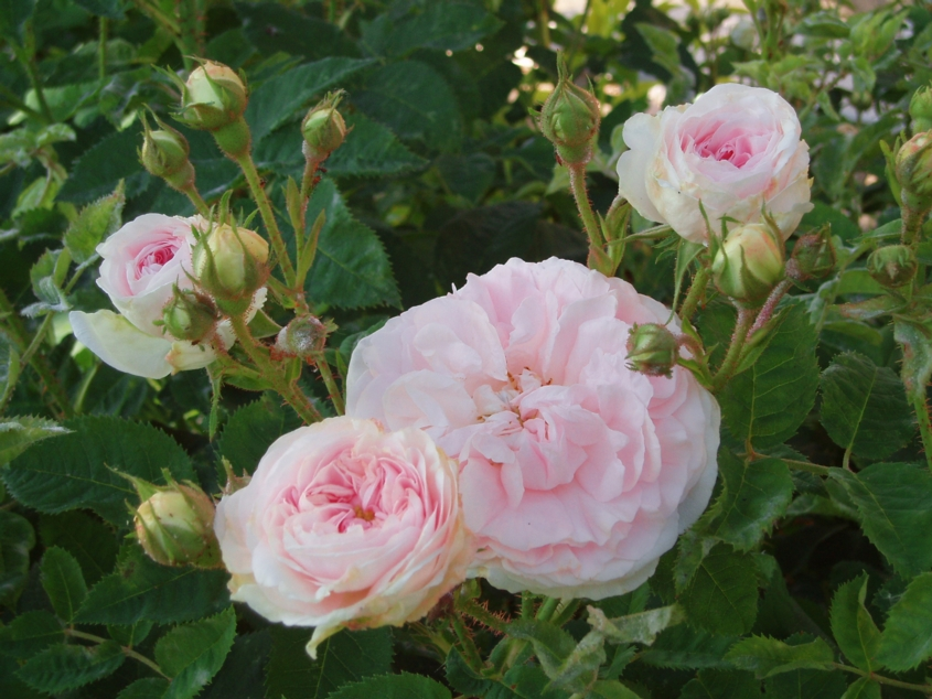 Fleurs de Cuisse de nymphe émue (roses) Utilisateur:Joan-T juin 2005